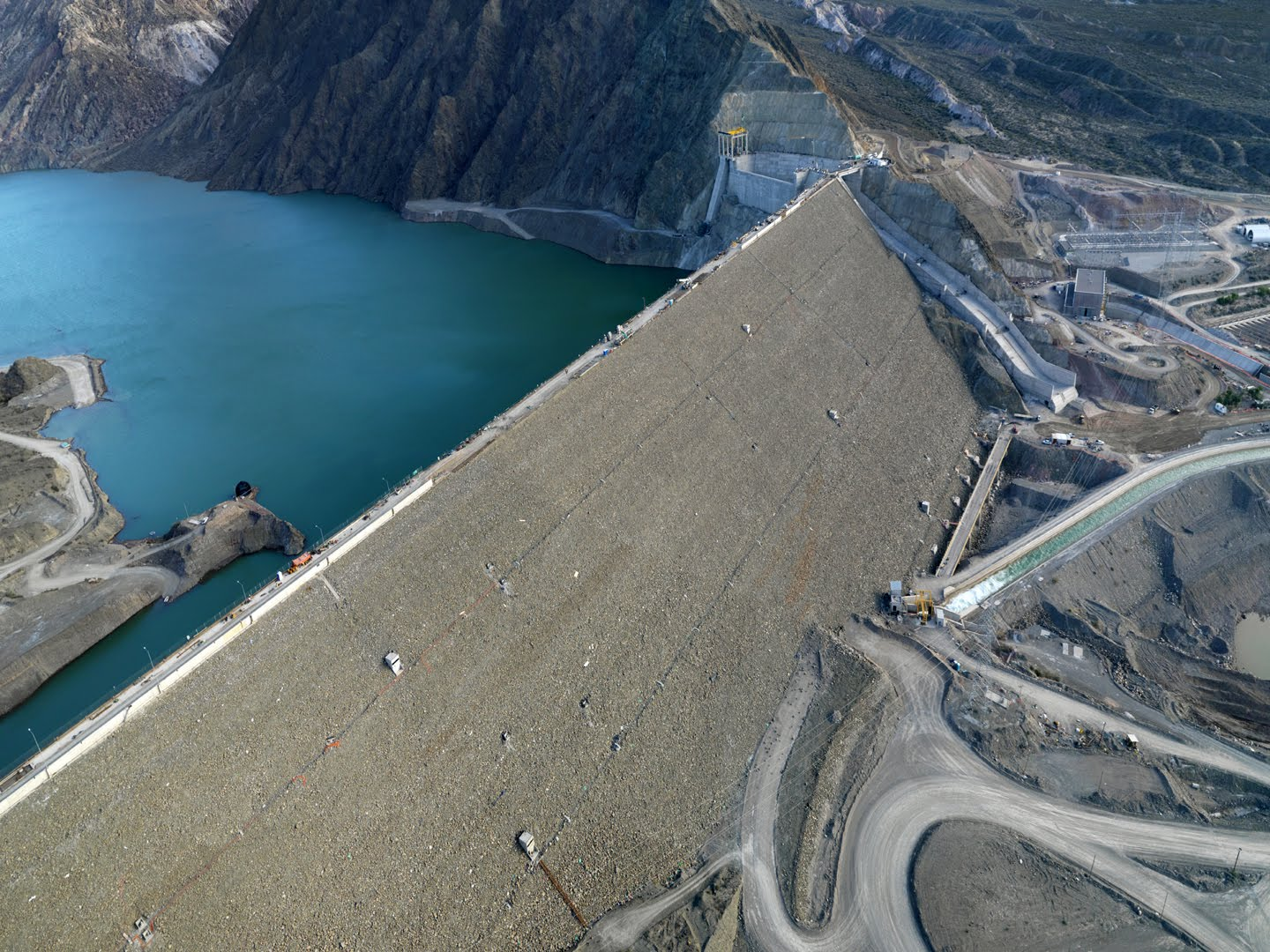 El embalse no se a logrado terminar de llenar pero se estima que a fines de 2016 estara completamente lleno